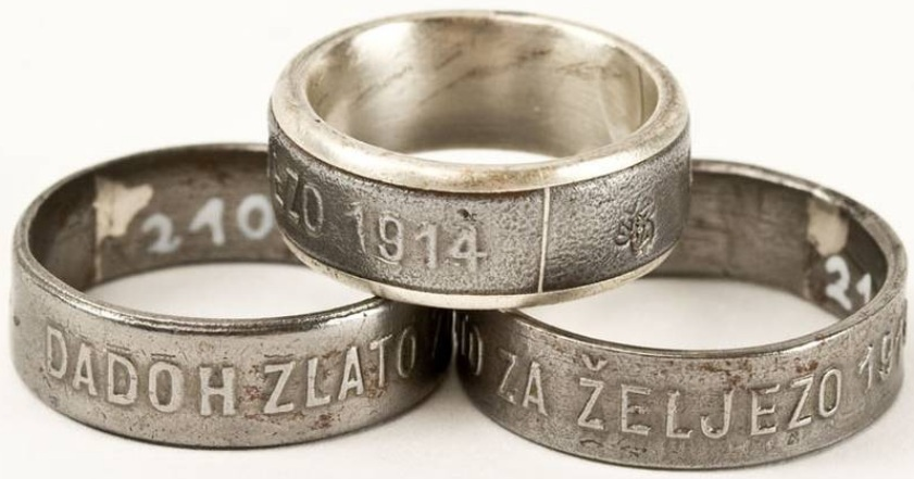 Dobrotvori prstenovi akcije "zlato za željezo" 1914.